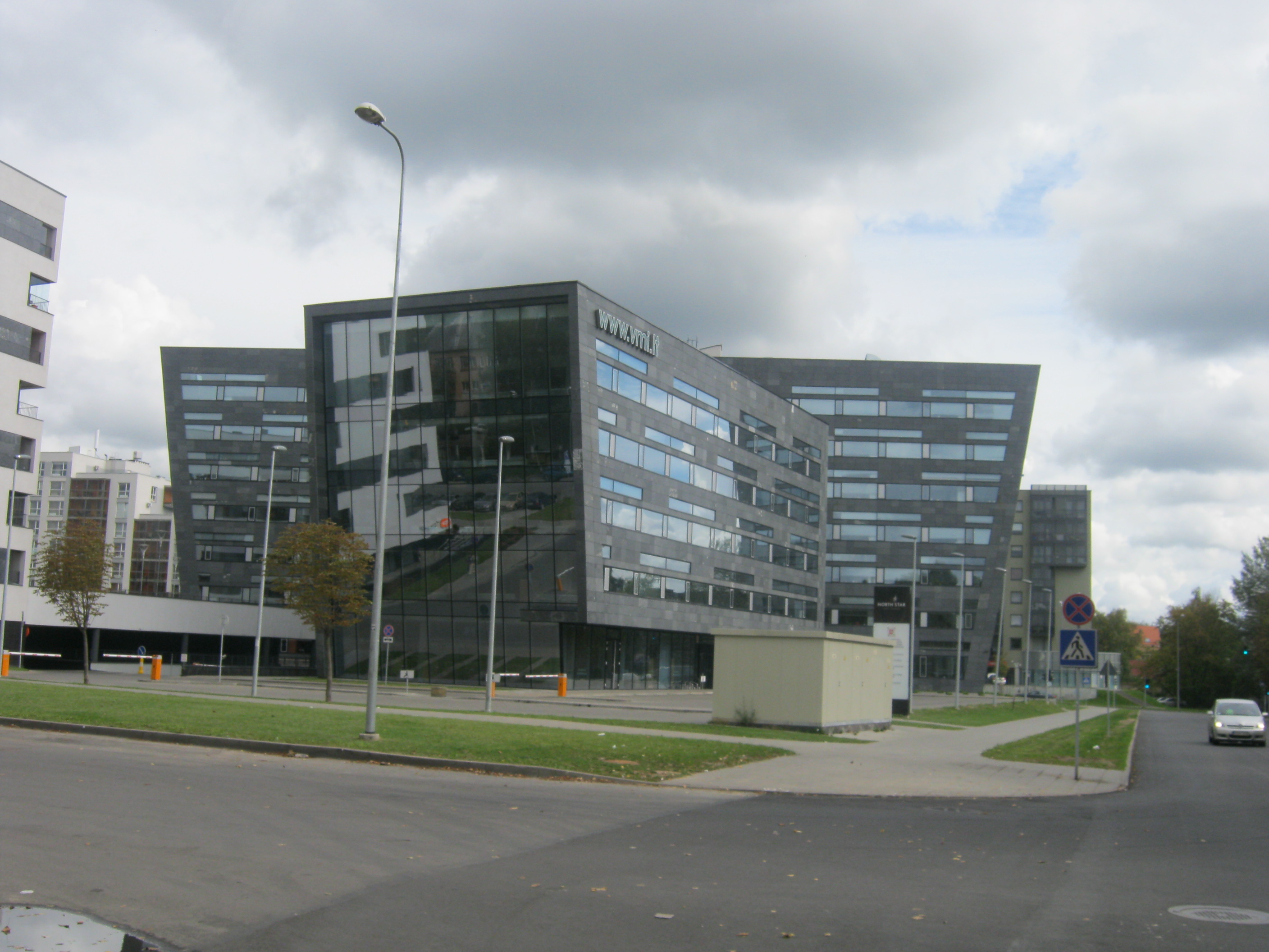 Mokesčių inspekcija Vilniuje